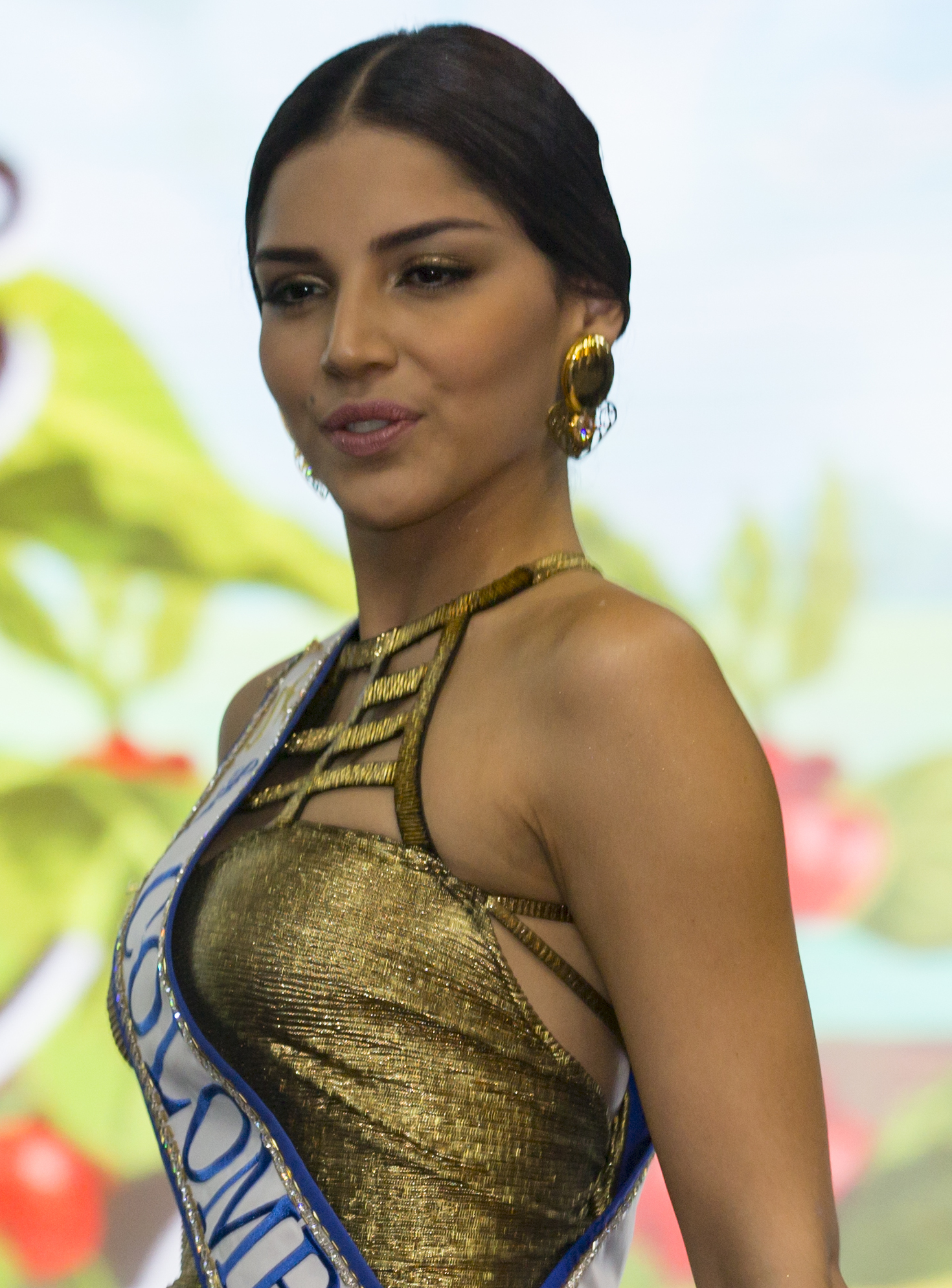 Café por un futuro 2017